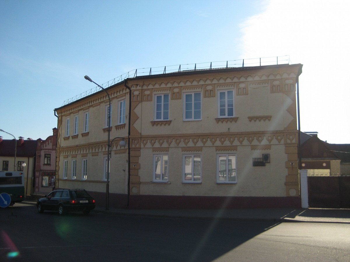 Краявіды Слоніма